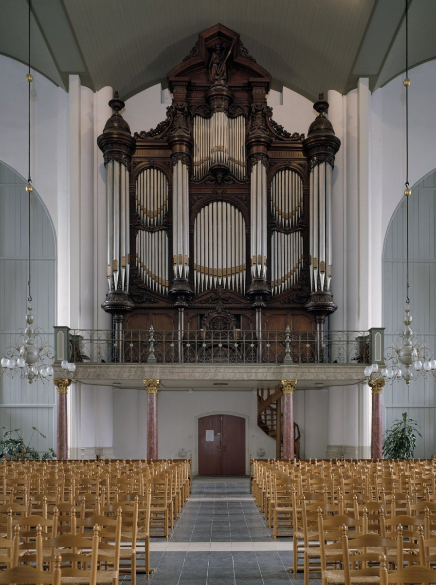 Sint Gertrudiskerk: Interieur, aanzicht orgel, orgelnummer 161 (opmerking: Gefotografeerd voor Het Historische Orgel in Nederland 1858-1865)